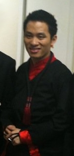 Ảnh chụp ca sĩ Tùng Dương sau cánh gà ở Casino de Paris, Pháp, trong chương trình biểu diễn phục vụ cộng đồng người Việt tại Paris tối ngày 25 tháng 9 năm 2010